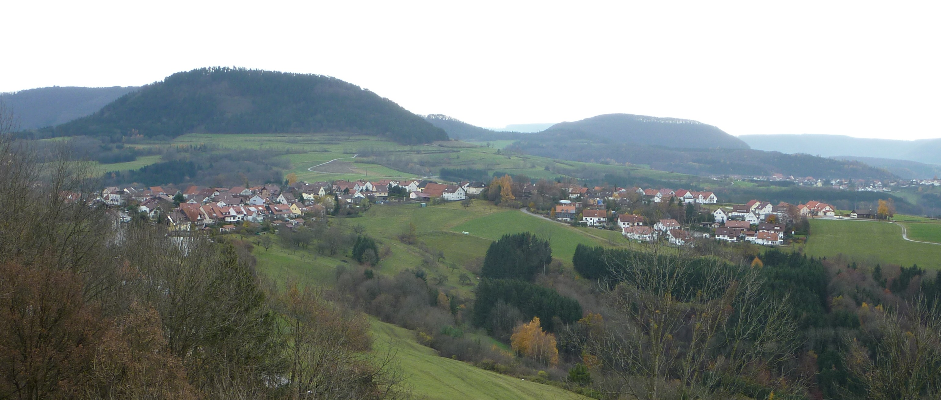 Rechberg, Ortsteil Vorderweiler mit Stuifen